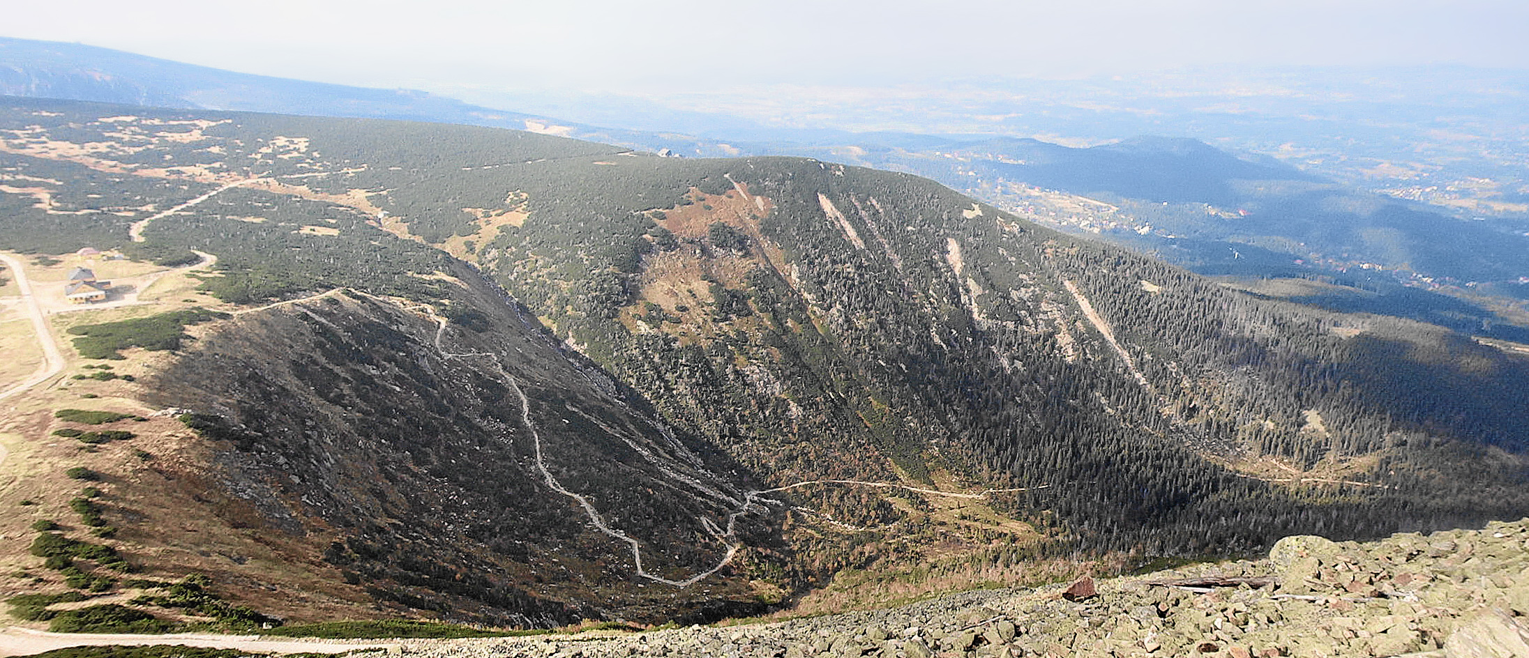 Aussicht von der Schneekoppe zum Melzergrund Melzergrund (Kocioł Łomniczki, wörtlich Łomniczka-Kessel) mit deutlich sichtbarem Flusslauf der Kleinen Lomnitz (Łomniczka), Riesengebirge (Karkonosze), Niederschlesien, Polen.